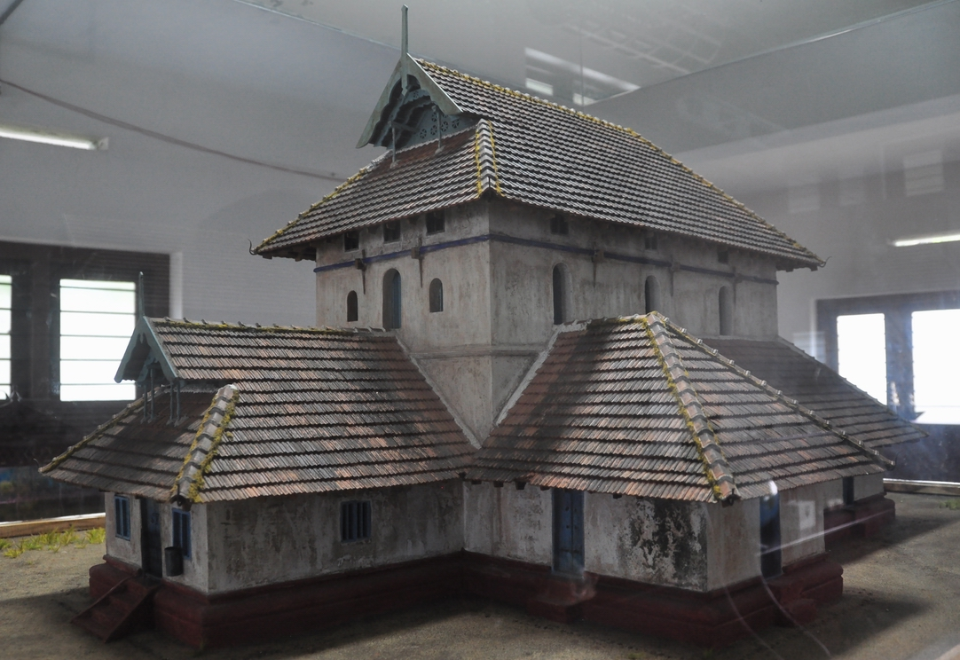 ചേരമാൻ ജൂമുഅ മസ്ജിദ്ന്റ്റെ പഴയ രൂപം. മാതൃക. പള്ളിയോടനുബന്ധിച്ചുള്ള കാഴ്ച. ചില്ലു കൂടിനു വെളിയിൽ നിന്ന് ട്യൂബ് ലൈറ്റിന്റെ വെളിച്ചത്തിൽ എടുത്തത്.